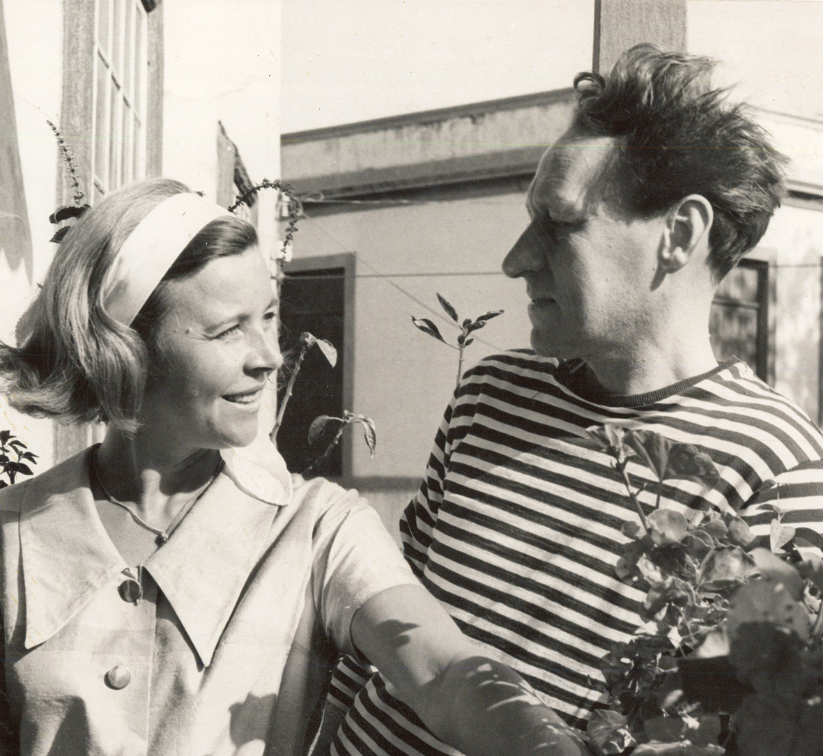 Alice Babs på besök hos Svenbörje Gaborn i Puerto de la Cruz, Teneriffa. 1960-tal. Fotograf: okänd.